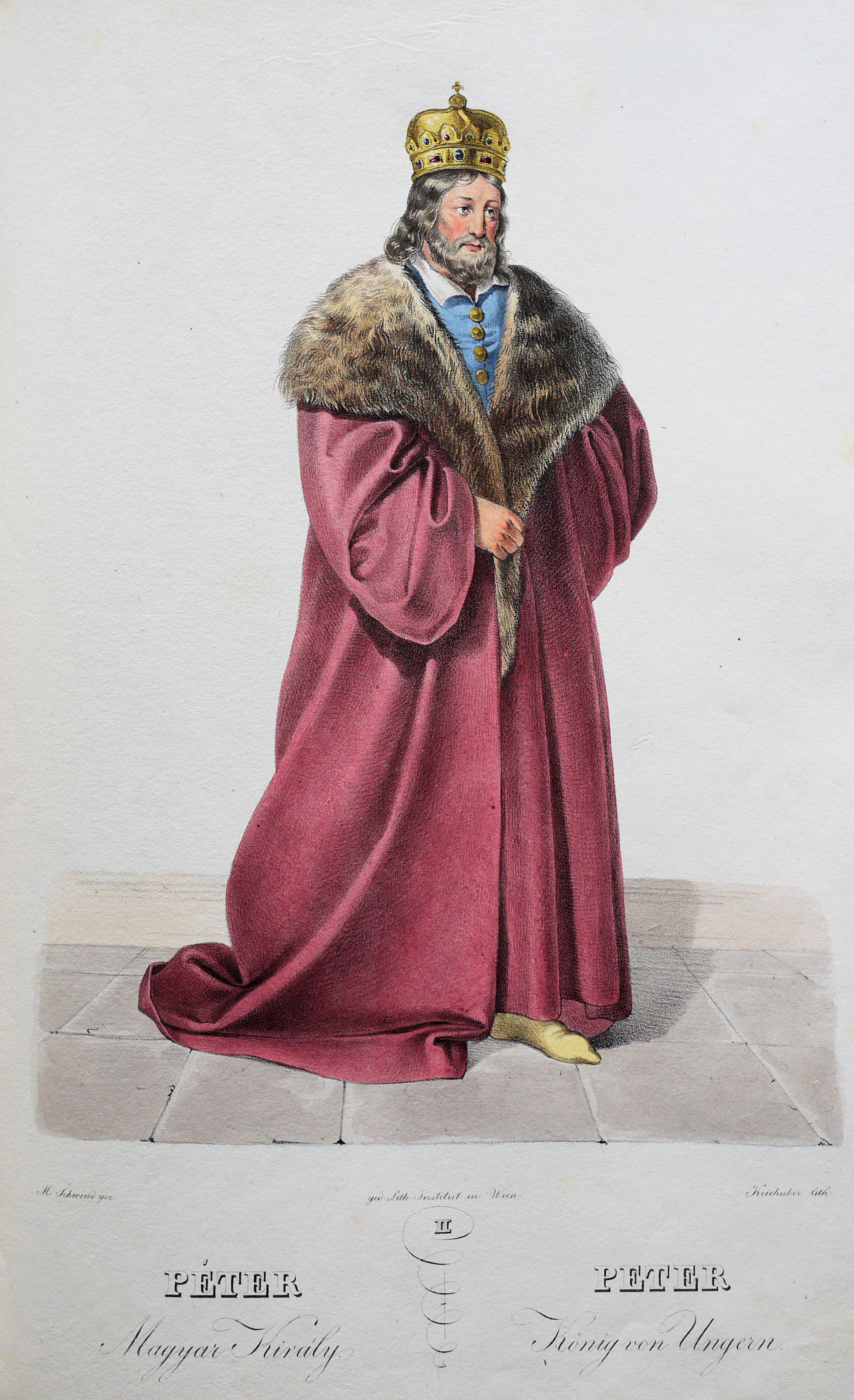 Peter Orseolo (1008-1046) König von Ungarn. Lithographie von Josef Kriehuber nach einer Zeichnung von Moritz von Schwind aus Ungerns Erste Heerführer Herzoge und Koenige In einer Reihe von Bildnissen von Bela bis auf Seine Majestät Franz I. Kaiser Von Österreich König Von Ungern &c., &c. Wien : Lithographisches Institut ; ca. 1828